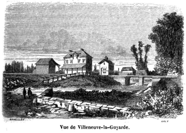 La gare de Villeneuve-la-Guyard(e), gravure exécutée par Dieudonné Lancelot en 1854 d'après un dessin d'après nature fait par lui-même.